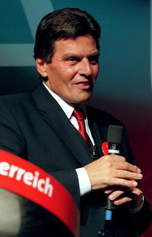 Der damalige Bundeskanzler Viktor Klima beim Landesparteitag der SPÖ OÖ 1988.